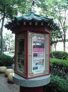 Greenmall商店街